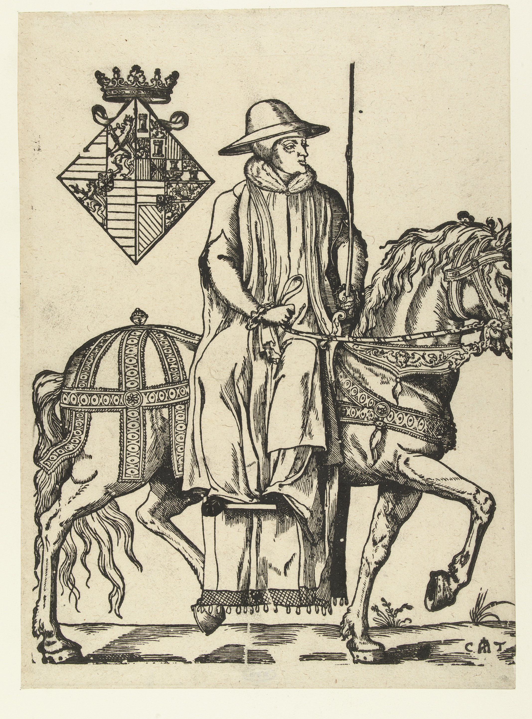 portrait de Marie de Hongrie